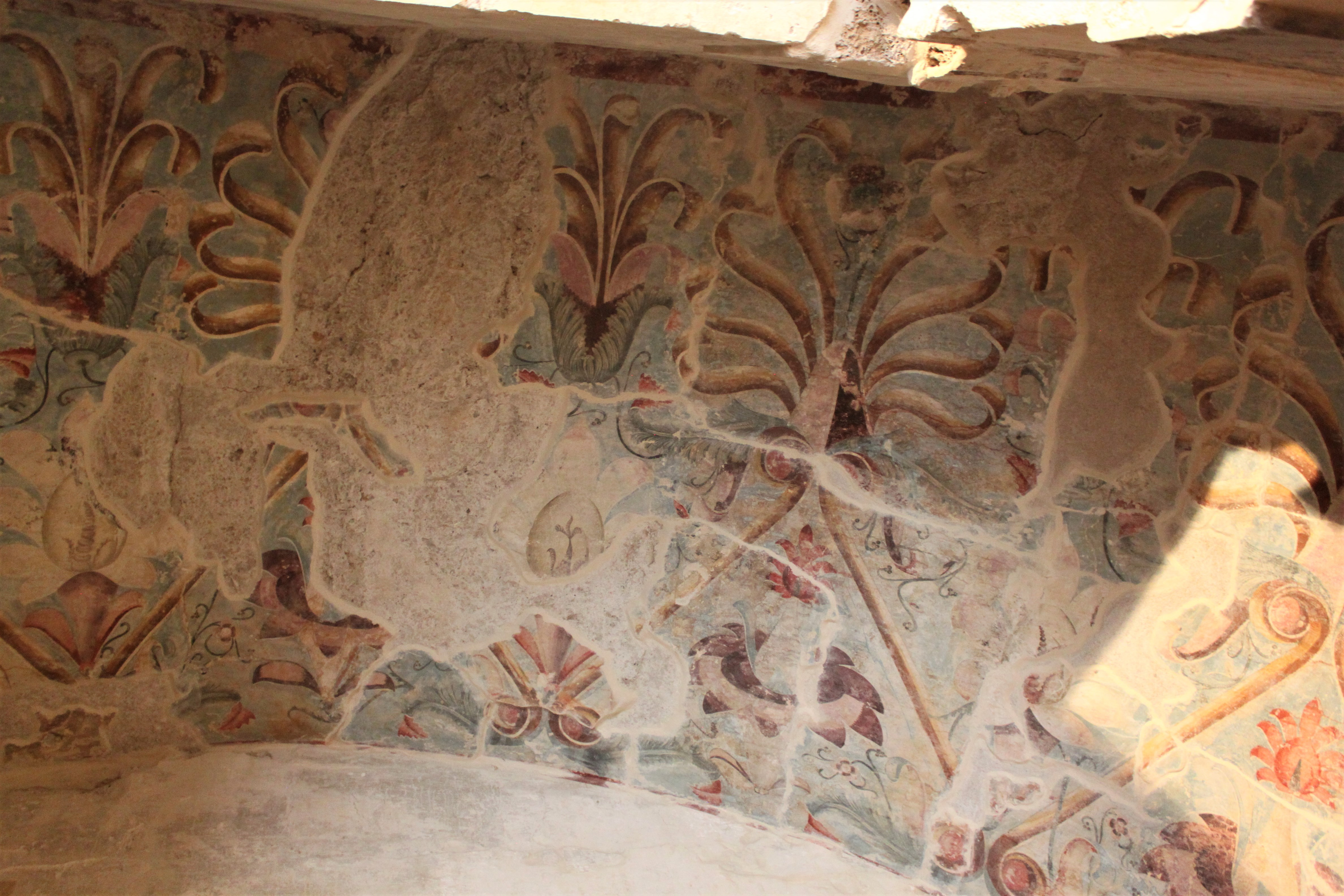 Plafond de l'antichambre de la tombe des palmettes à Lefkadia (Macédoine, Grèce)